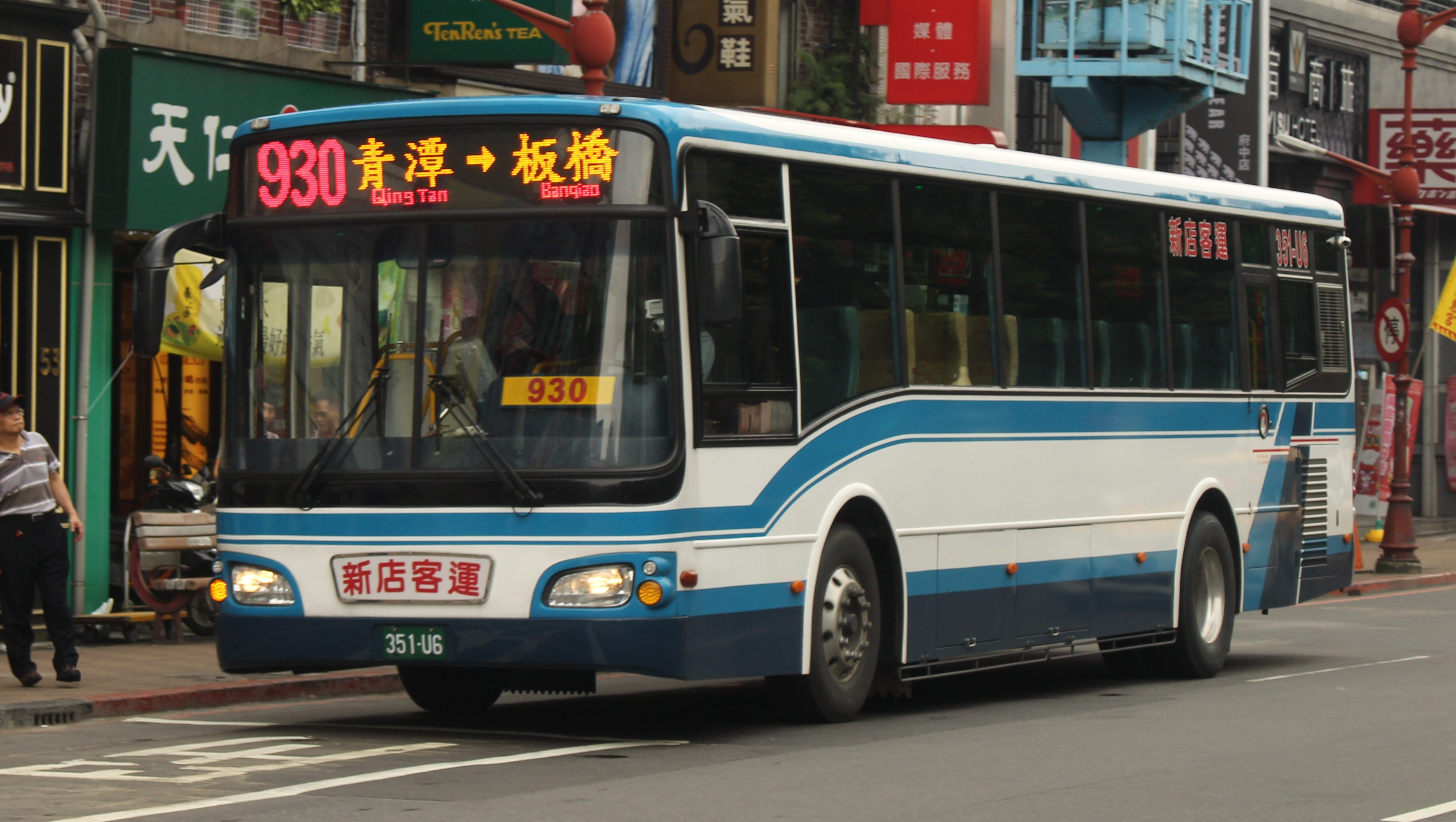 新店客運 2015 HINO RK8JRVA-KJF 351-U6 930